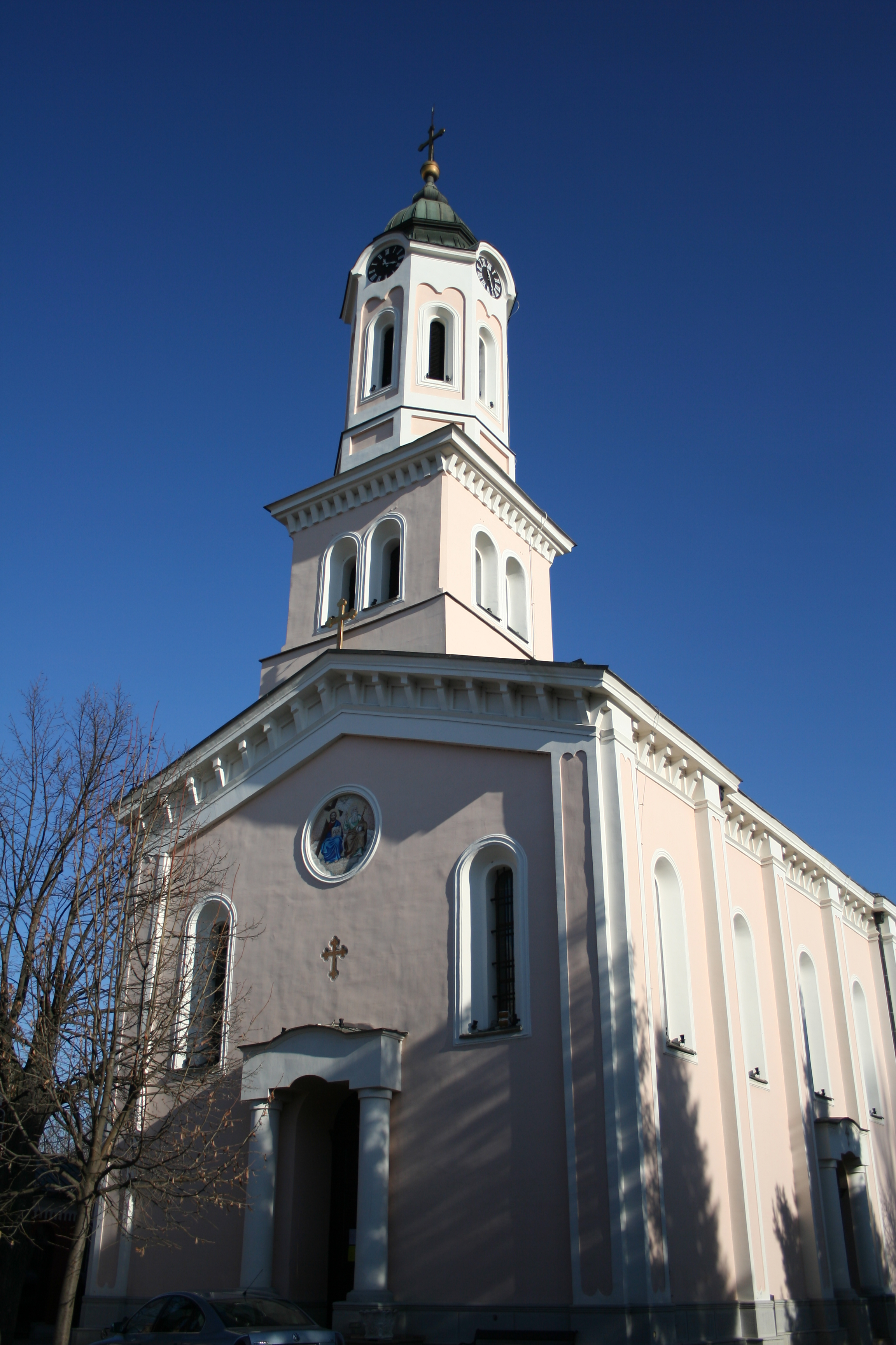 Crkva u Obrenovcu